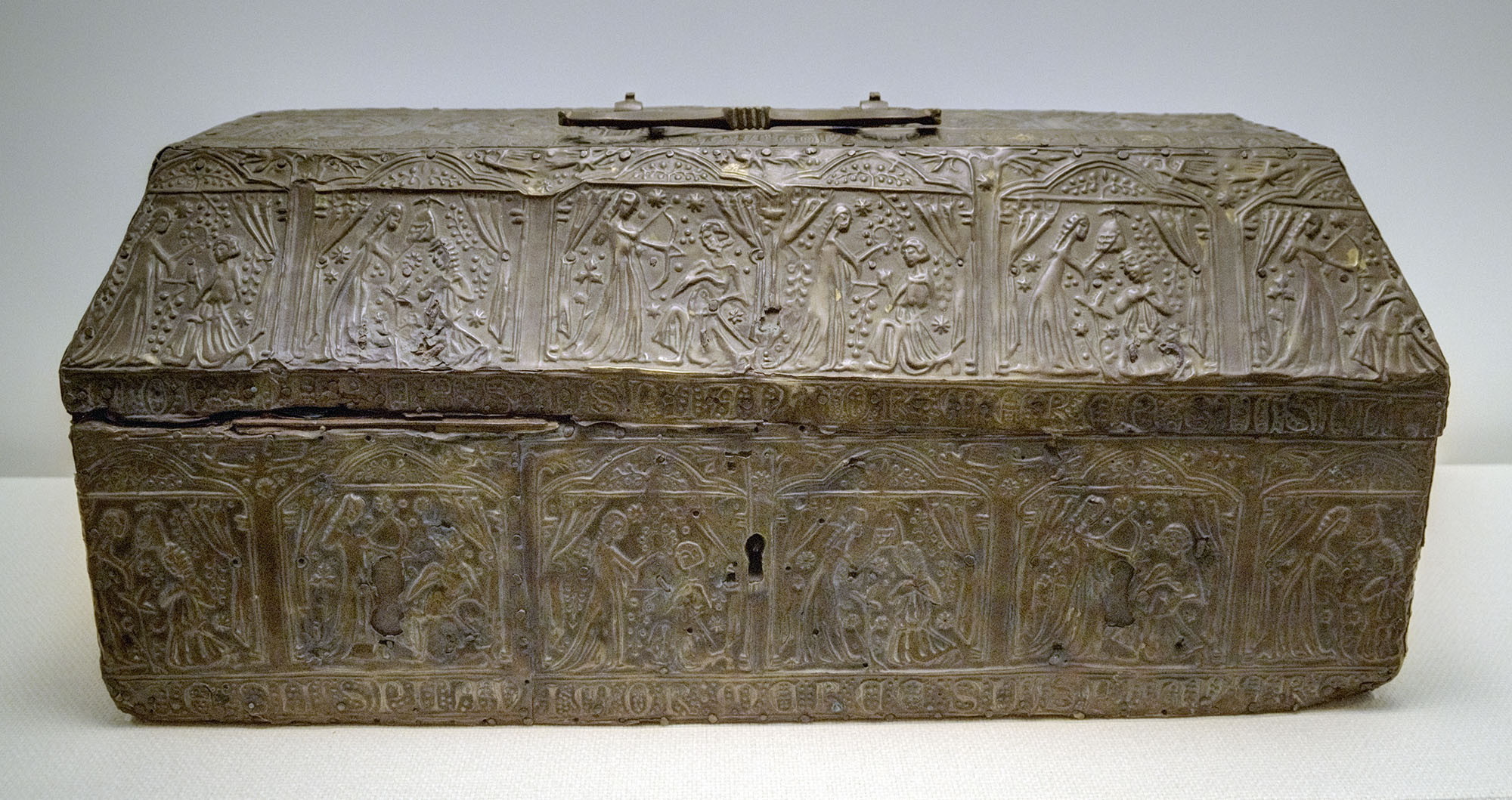 Cofre en madera con cobre repujado procedente del sur de Francia o España. Datado entre 1450 y 1530. Fotografiado en la exposición Los pilares de Europa, en Caixa Forum Madrid. Pertenece al British Museum.